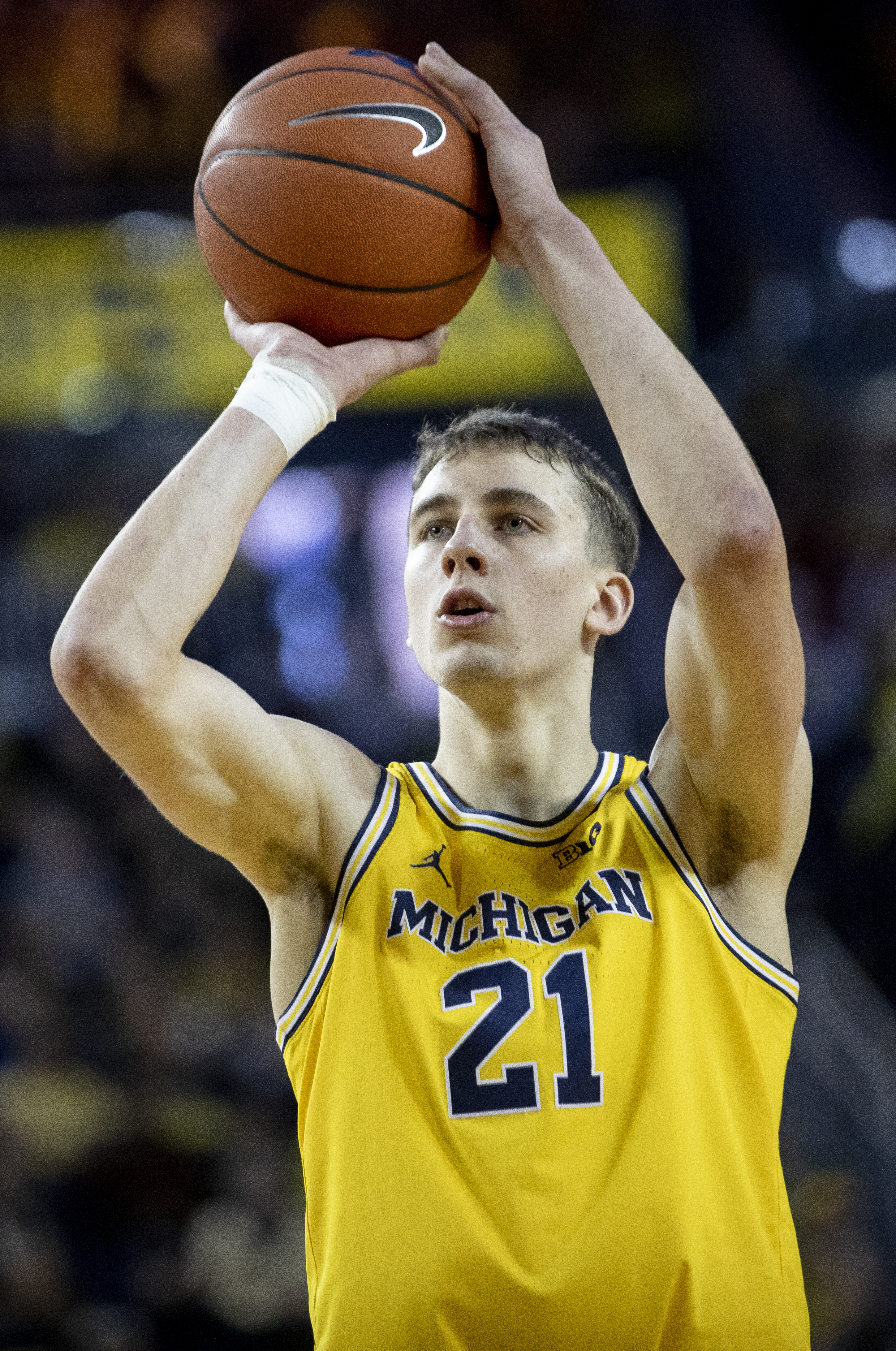 _O6A3647